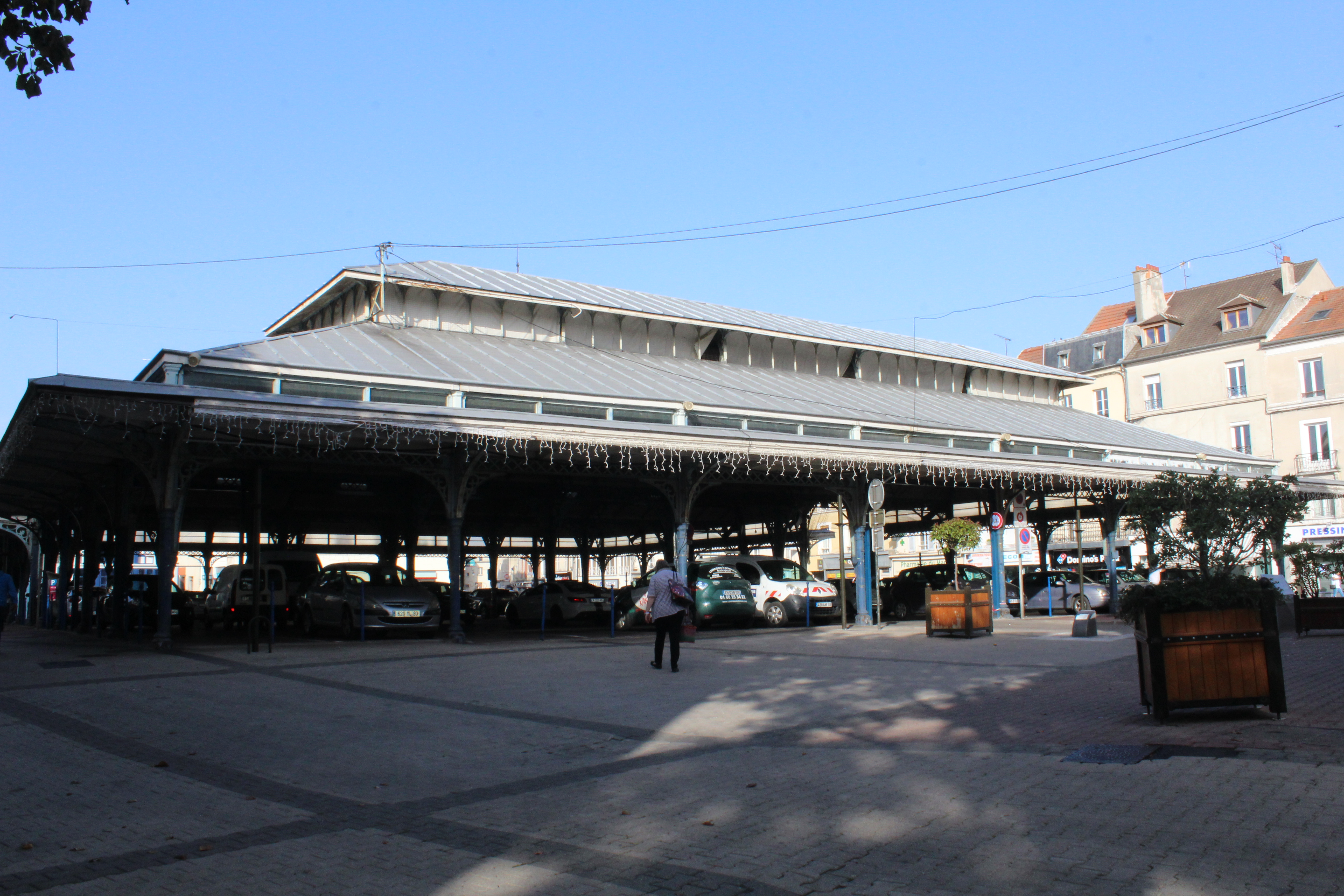 Halle de Meaux.